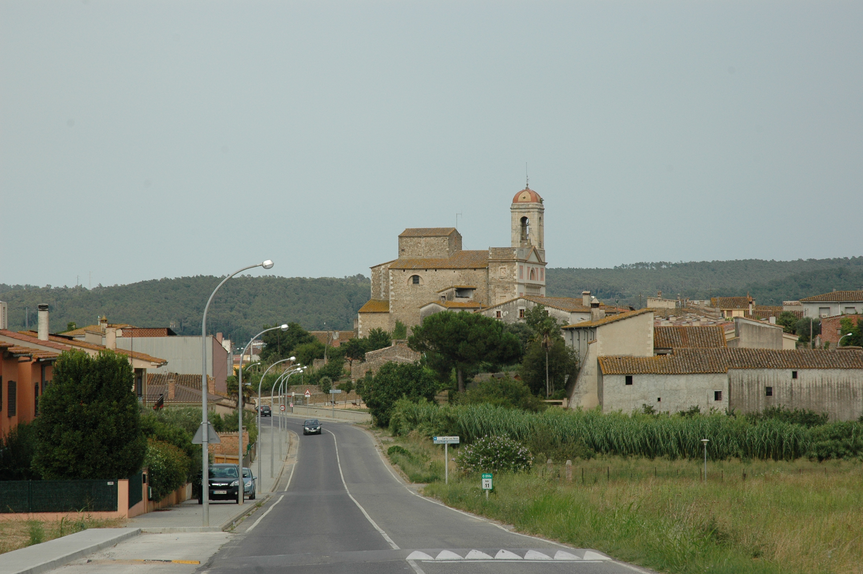 Sant Joan de Mollet